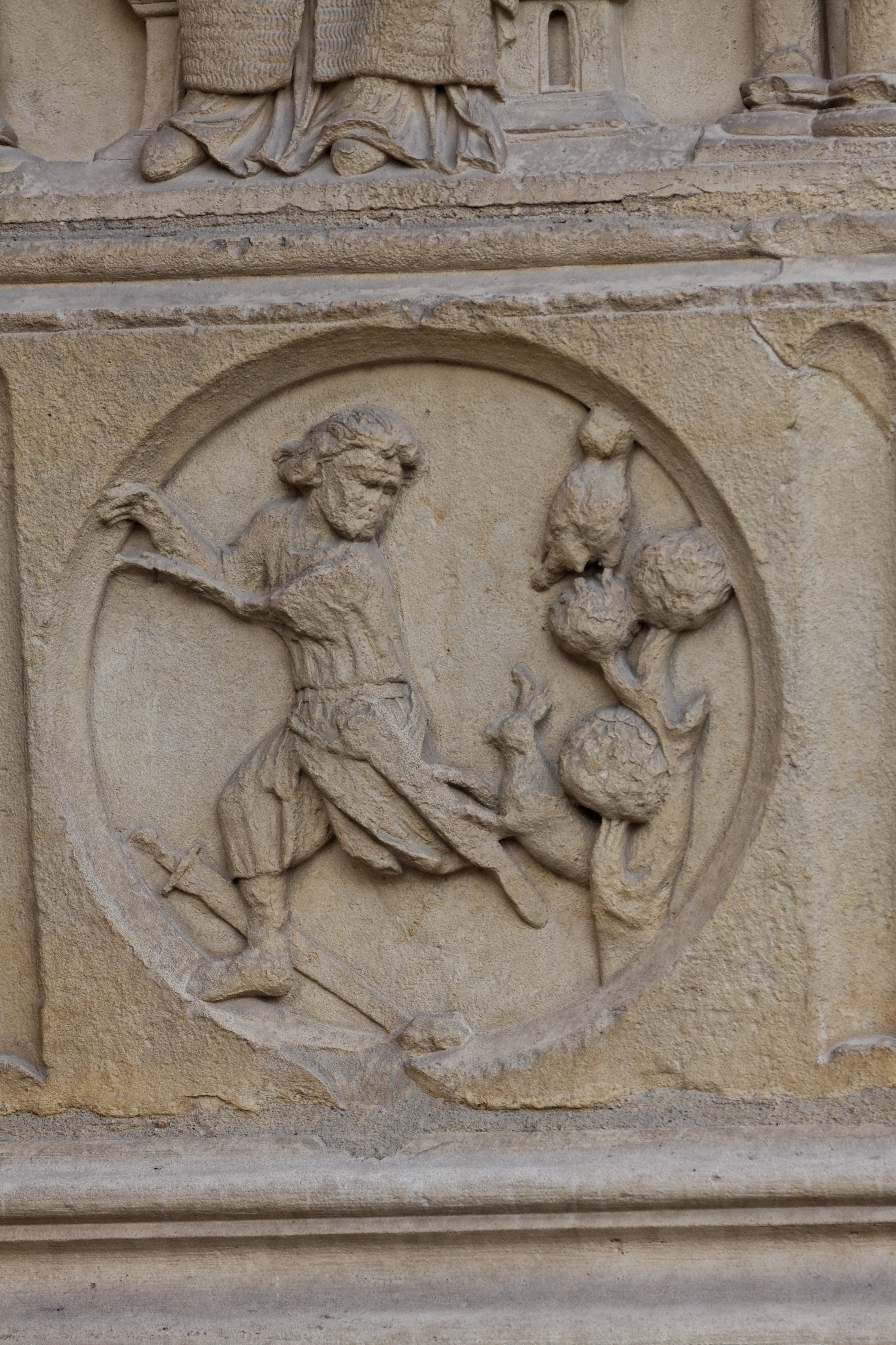 Vue d'un détail du portail du Jugement dernier sur la façade ouest de la cathédrale Notre-Dame de Paris.